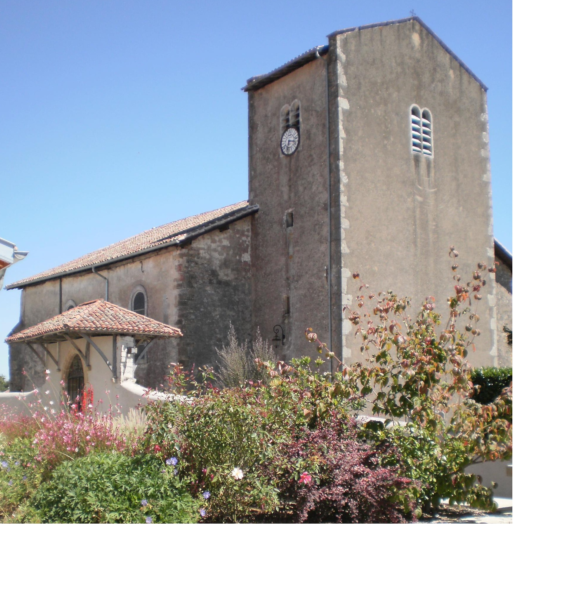 Eglise de Saint-Etienne-d'Orthe (Landes), vue du porche & du clocher (façade ouest) depuis le N-O, extérieur.